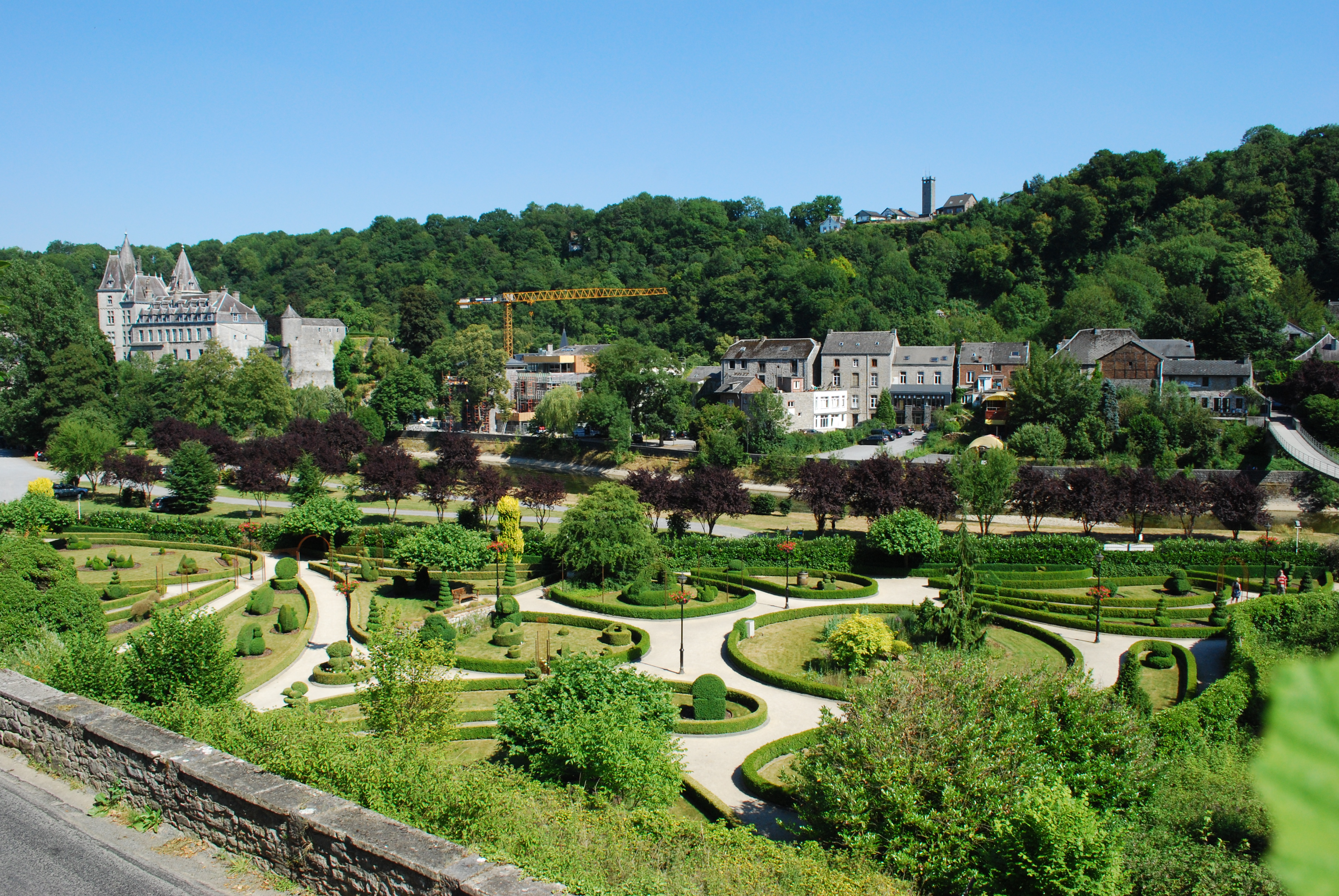 Durbuy : vue d'ensemble depuis la rue de la Haie Himbe.